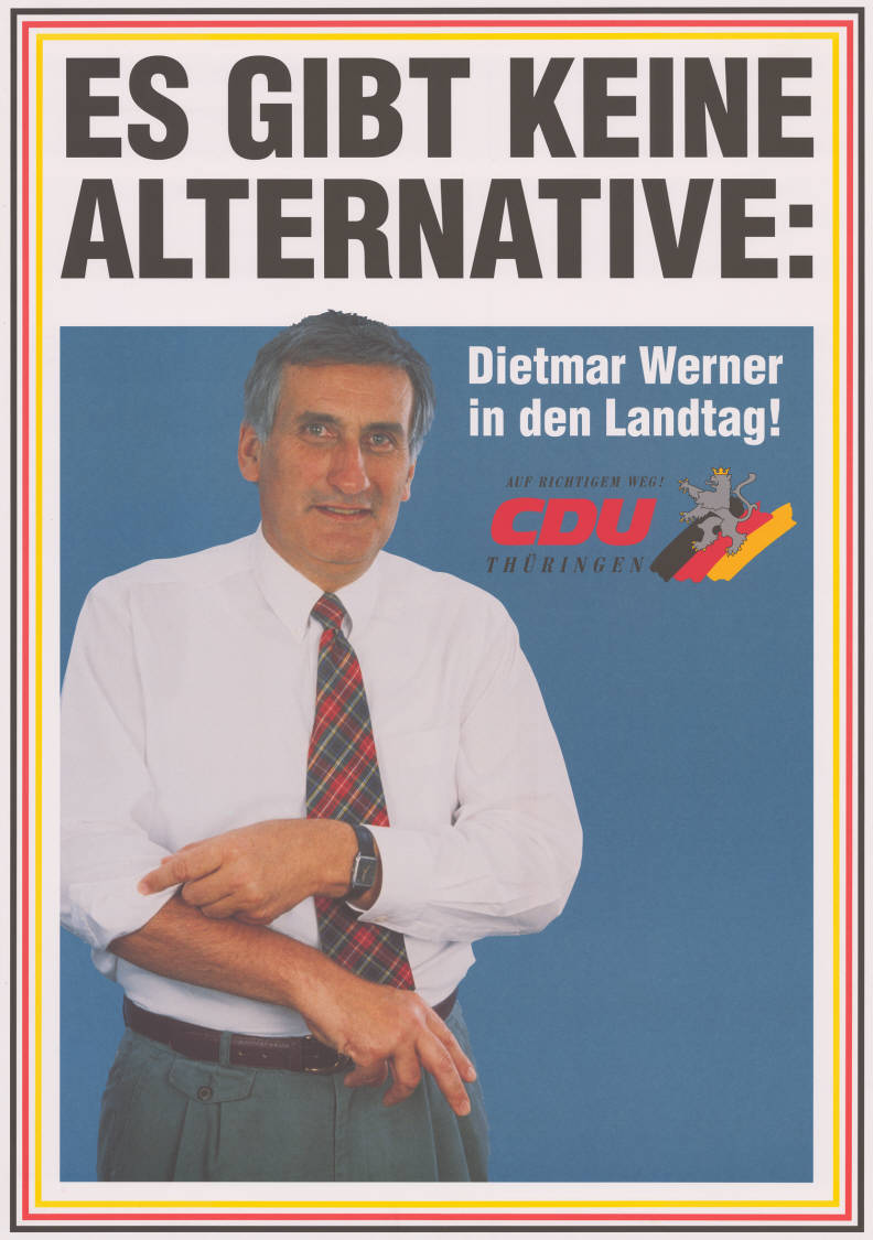 Es gibt keine Alternative: Dietmar Werner in den Landtag! Auf richtigem Weg CDU ThüringenAbbildung:Foto - Dietmar Werner krempelt die Hemdsärmel hoch - Thüringer Löwe - NationalfarbenPlakatart:Kandidaten-/Personenplakat mit PorträtAuftraggeber:CDU LV ThüringenObjekt-Signatur:10-037 : 117Bestand:Landtagswahlplakate Thüringen (10-037)GliederungBestand10-18:Landtagswahlplakate Thüringen (10-037) » CDULizenz:KAS/ACDP 10-037 : 117 CC-BY-SA 3.0 DE